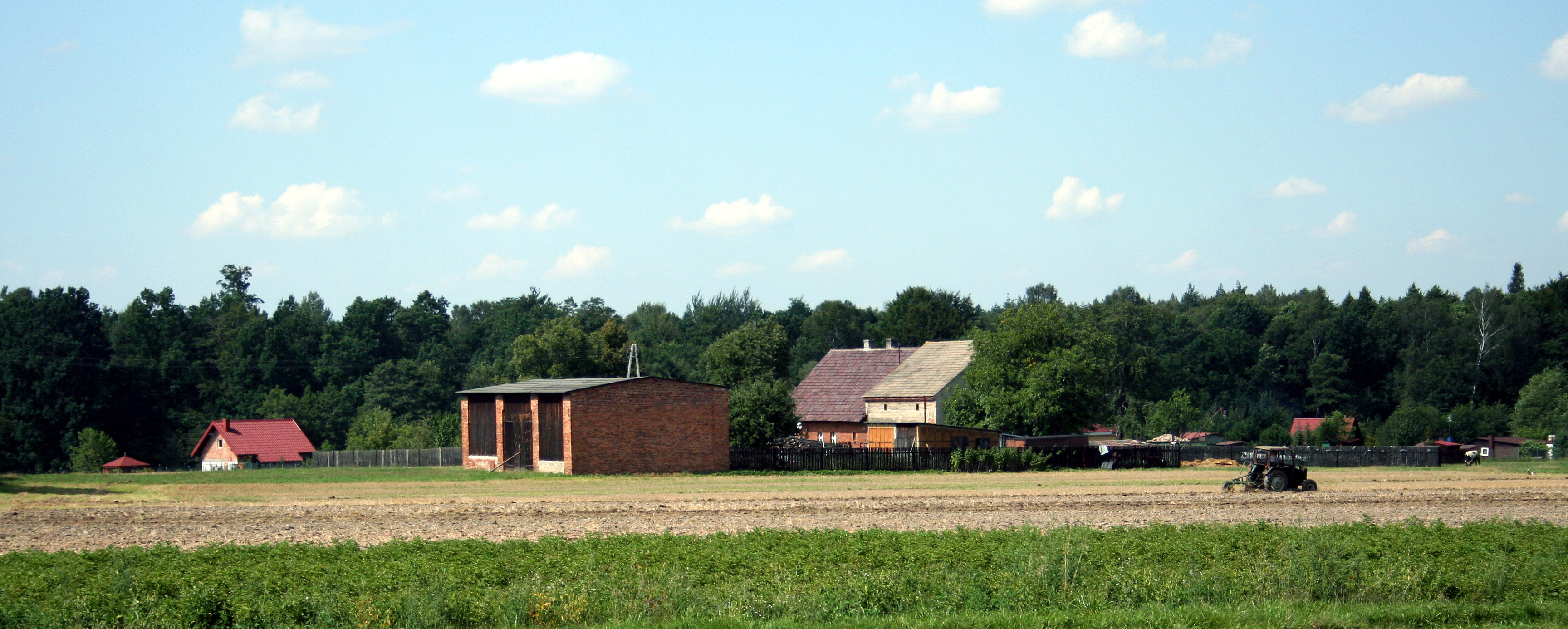 Panorama miejscowości Sitki, gmina Boronów, powiat lubliniecki